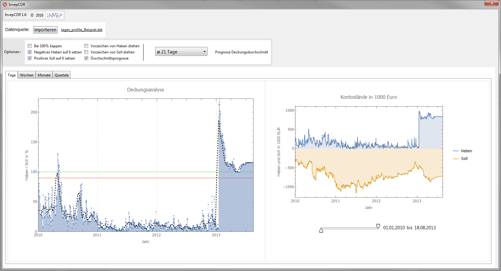 Deckungsanalyse Soll/Haben